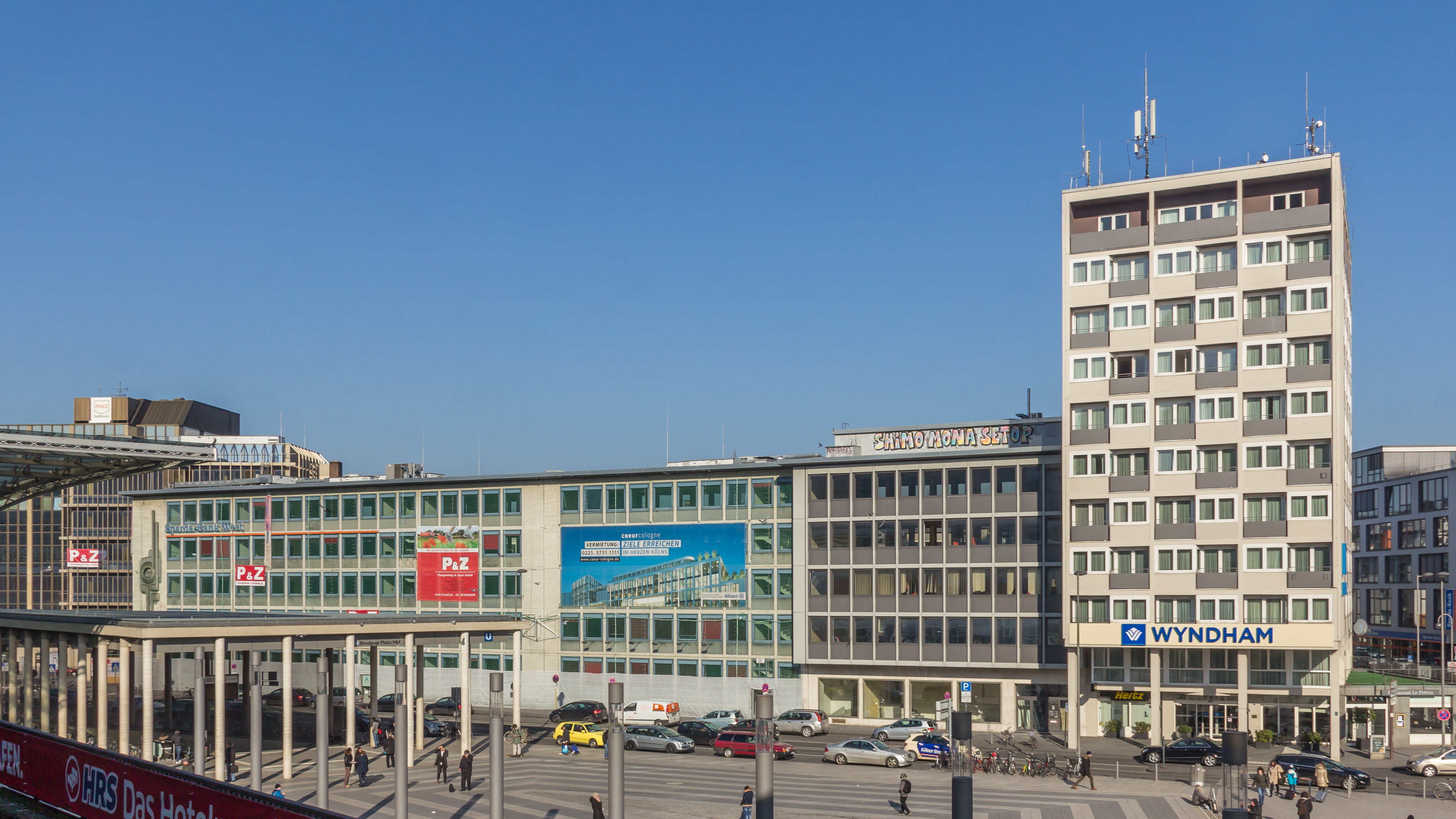 Bürogebäude Breslauer Platz 2c, 2b (links) kurz vor dem Abriss. Nach dem Abriss soll an derselben Stelle der Gebäudekomplex „Coeur Cologne“ entstehen. Rechts außen: Hotel Wyndham (Breslauer Platz 2) links daneben Bürogebäude Breslauer Platz 2a